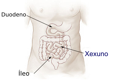 partes do intestino delgado en galego